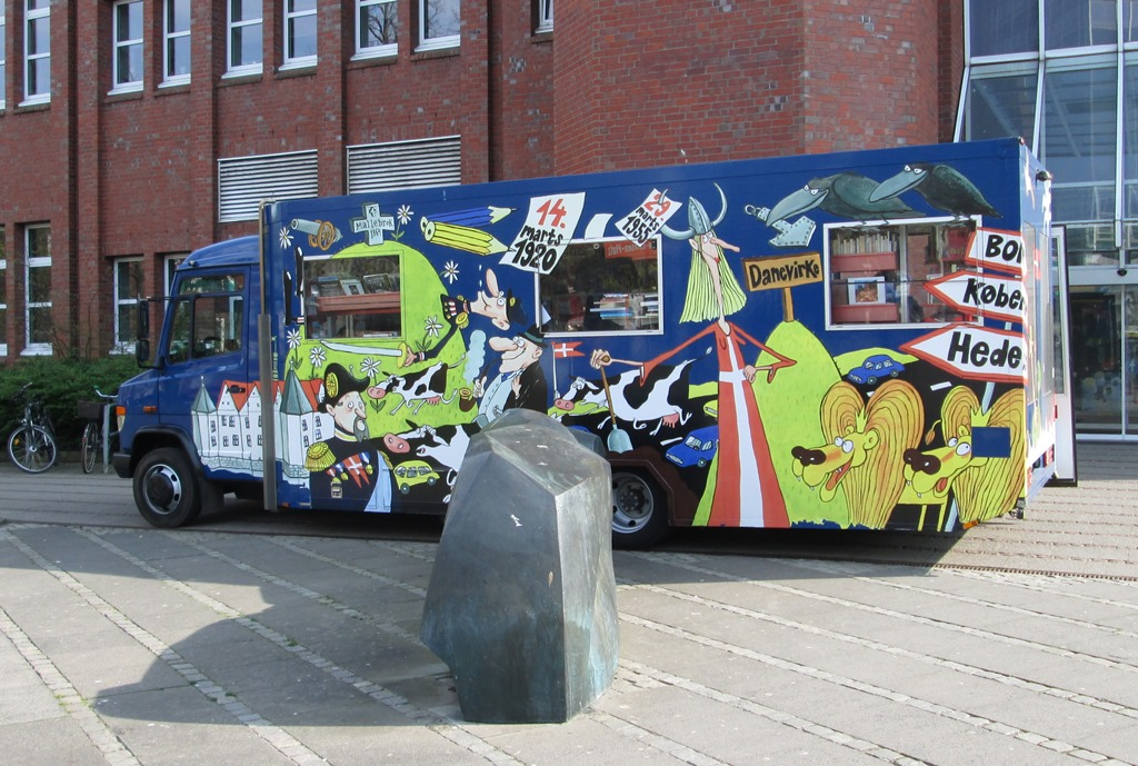 Dansk Centralibliotek for Sydslesvigs bogbus. Illustrationerne på bogbussen viser bl. a. de sønderjyske / slesvigske løver (nederst til højre), Thyra Danebod og Dannevirket (i midten), ravnene Hugin og Munin (øverst til højre), kong Frederik 7. og Lyksborg Slot (nederst til venstre)